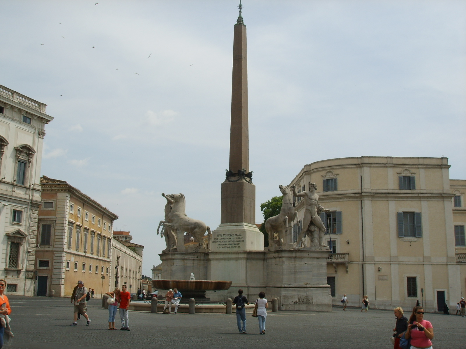 Fontana del Quirinale a Roma.